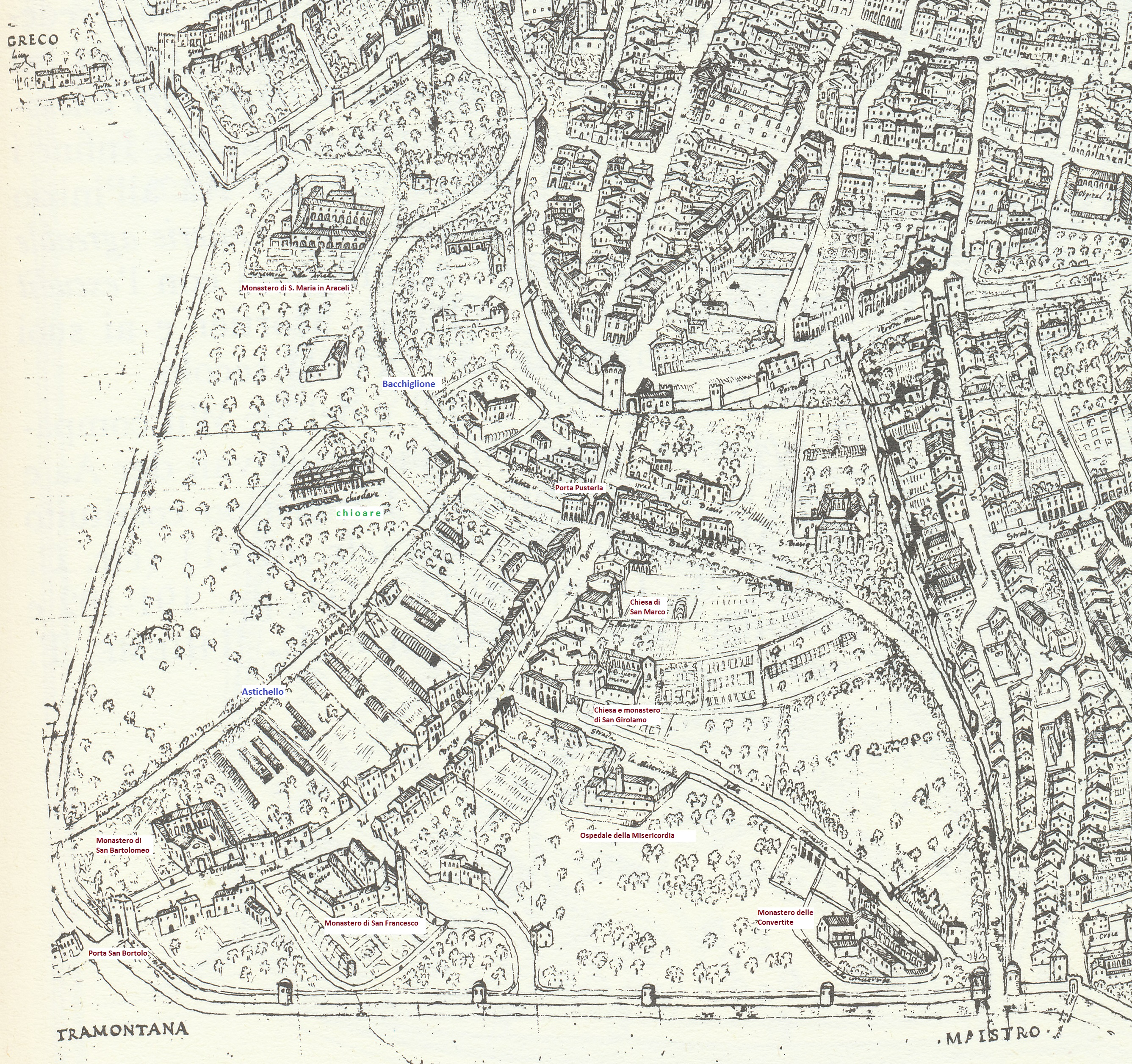 Vicenza - Pianta Angelica - disegnata nel 1580 da Giovanni Battista Pittoni - particolare con tags